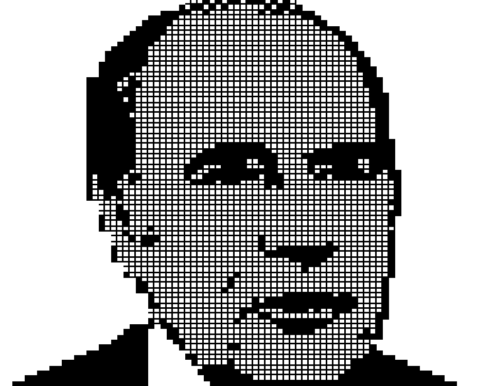 • Portrait de François Mitterrand en Minitel art Vidéotex le 10 mai 1981 à 20 heures sur Antenne 2. • Version 320×250 pixels (1ère ligne ajoutée car l'animation était très ambiguë sur les calvities). • Le ratio diffère de la photo sur INA.fr, où le portrait est plus mince (je vous laisse corriger). • Copie visuelle fidèle aux blocs tels que vus à la télévision (caractères semi-graphiques testés). • Source et Minitel-artiste inconnus [contribution souhaitée] - cette photo est-elle déjà oubliée ? • (Il s'agit d'un style de dessin à l'encre de Chine ; le haut semble avoir été retouché à droite.) • (Le fichier a peut-être ensuite circulé à l'époque ; mais concernant celui du portrait de VGE… ?)